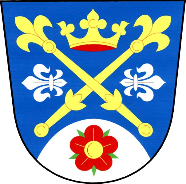 Česky: znak obce Řípec